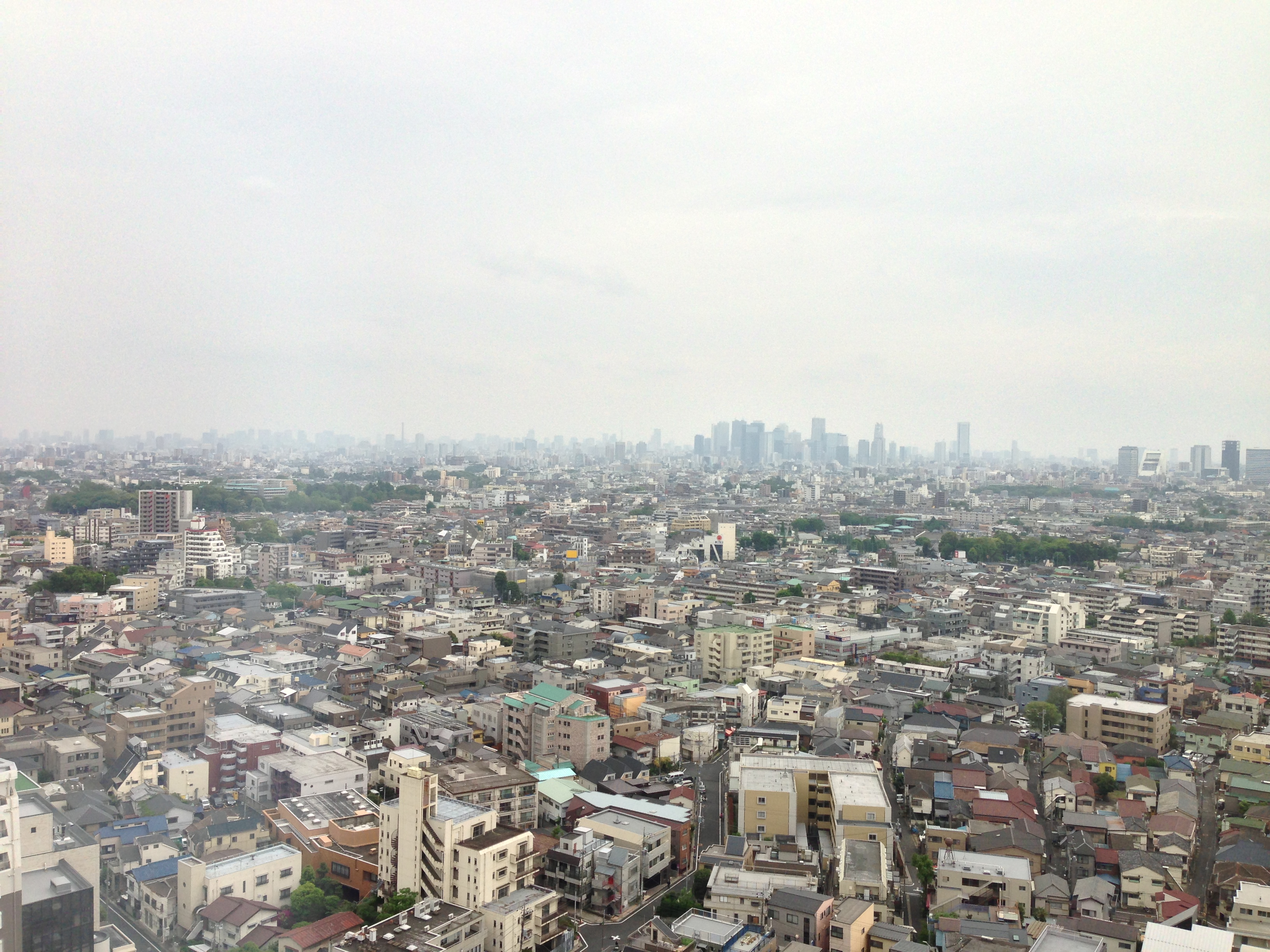 練馬区役所